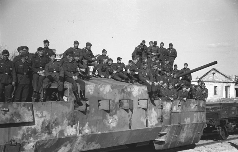 Krim, 1942 Oberstlt. v. Ahlfen besichtigt Panzerzug